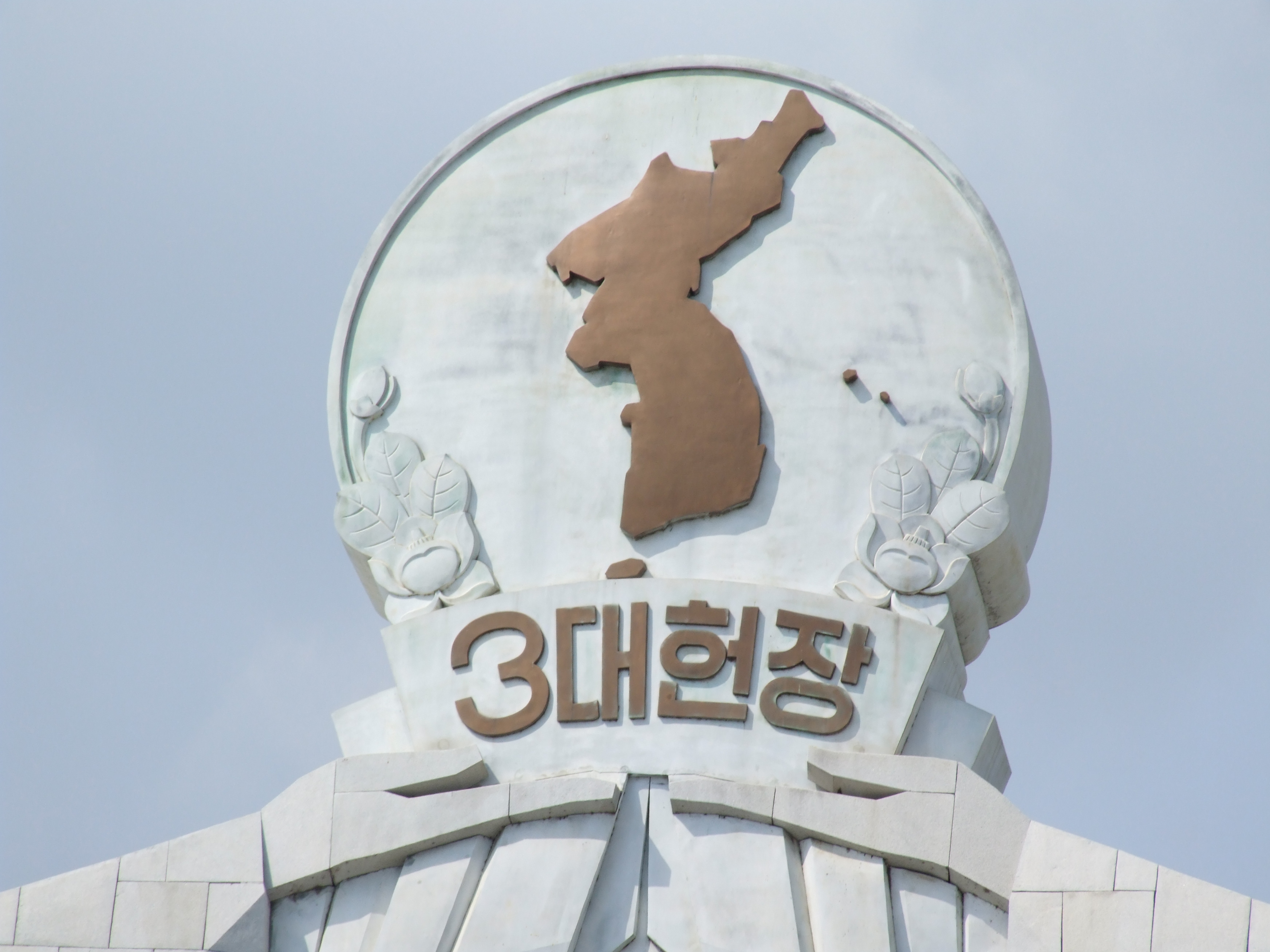 Denkmal für die Wiedervereinigung in Pjöngjang, Nordkorea